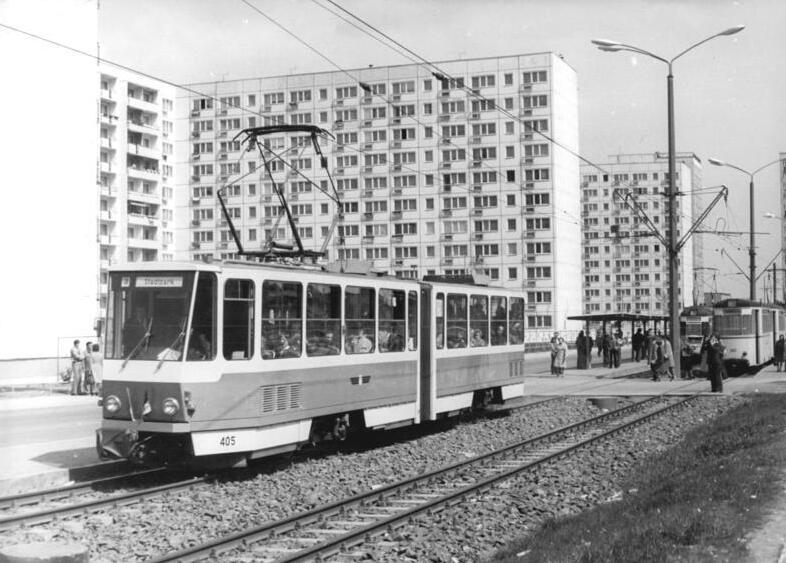 Erfurt, Wohnblocks, Straßenbahn ADN-ZB Ludwig-1.5.76 Erfurt: Ihre "Jungfernfahrt" traten am 1.5. zwei Straßenbahnzüge des Typs KT 4 D aus den Prager Tatra-Werken in Erfurt an. Sie sind die beiden ersten Straßenbahnzüge von insgesamt 20 Zügen dieses neuen Typs, die in Erfurt eingesetzt werden. Zunächst verkehren sie in dem Neubaugebiet im Norden der Bezirksstadt, wo nach Fertigstellung 45.000 Menschen wohnen werden.